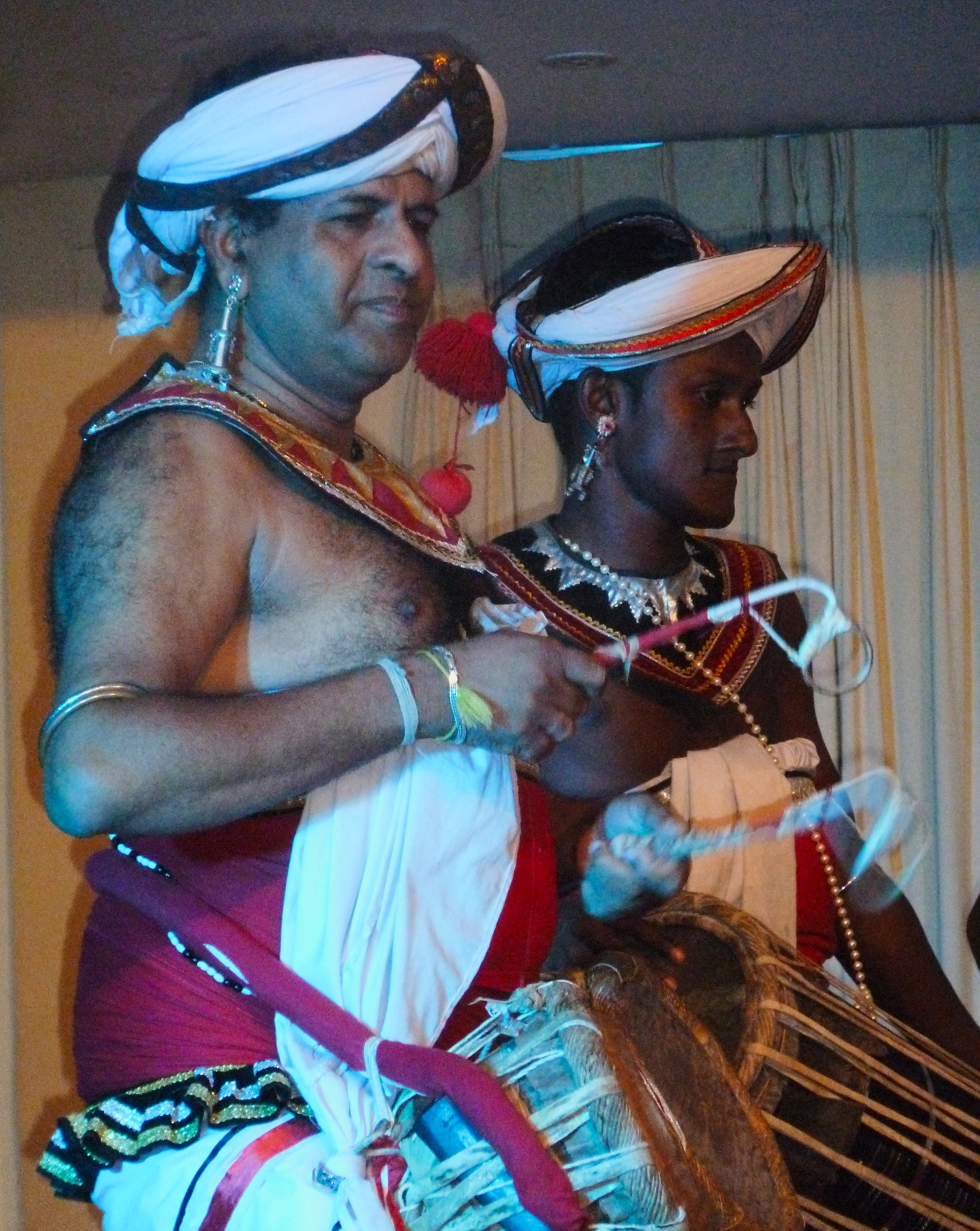 Oak- Ray Kadyan Dance à Kandy Sri Lanka.- Asie du Sud